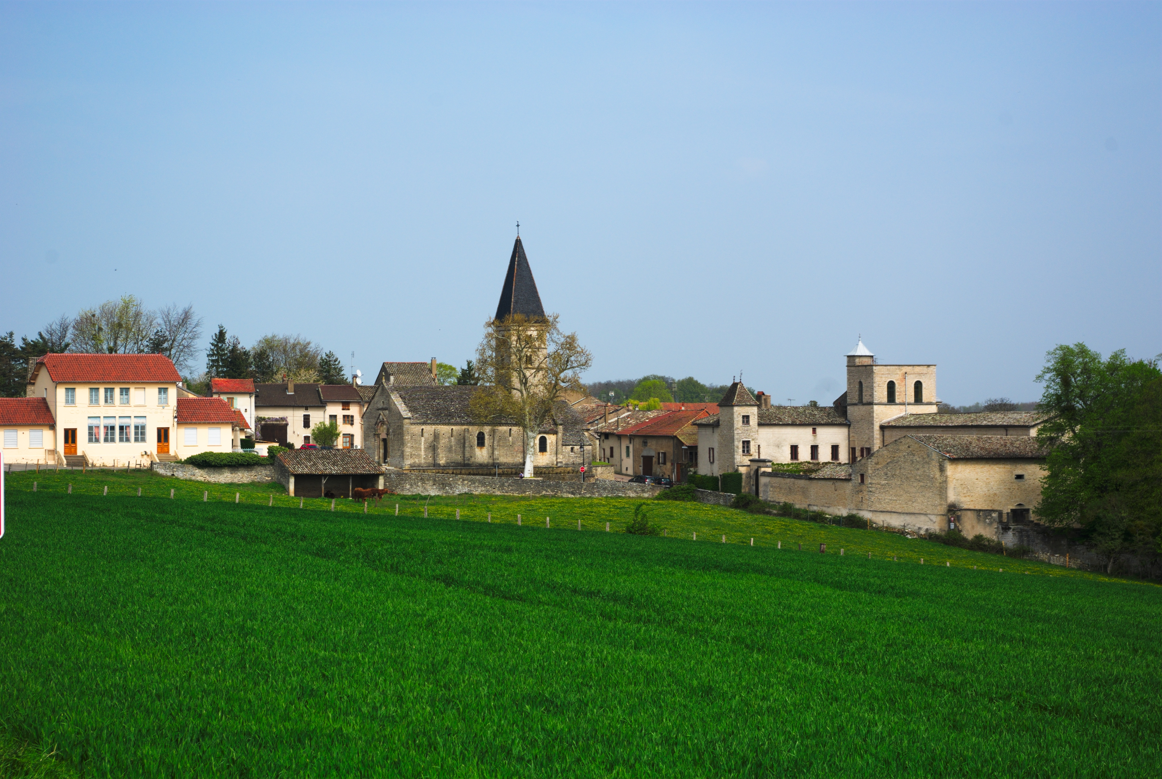 Farges-les-Mâcon.